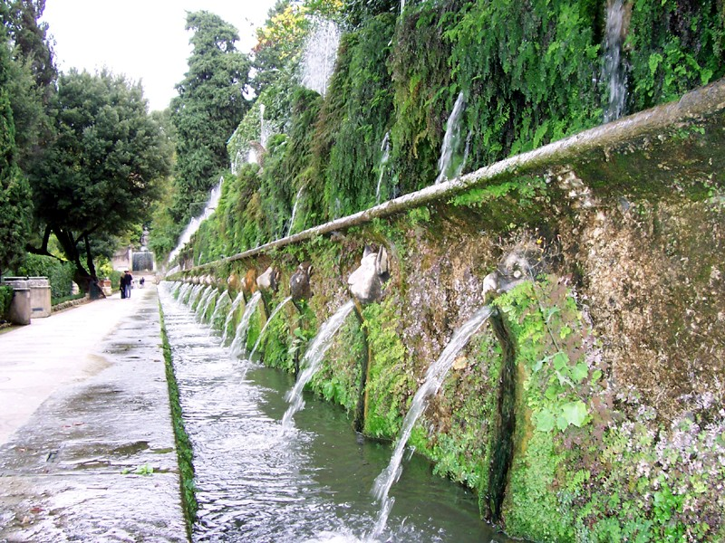 Tivoli - Cento fontane nei Giardini di Villa d'Este